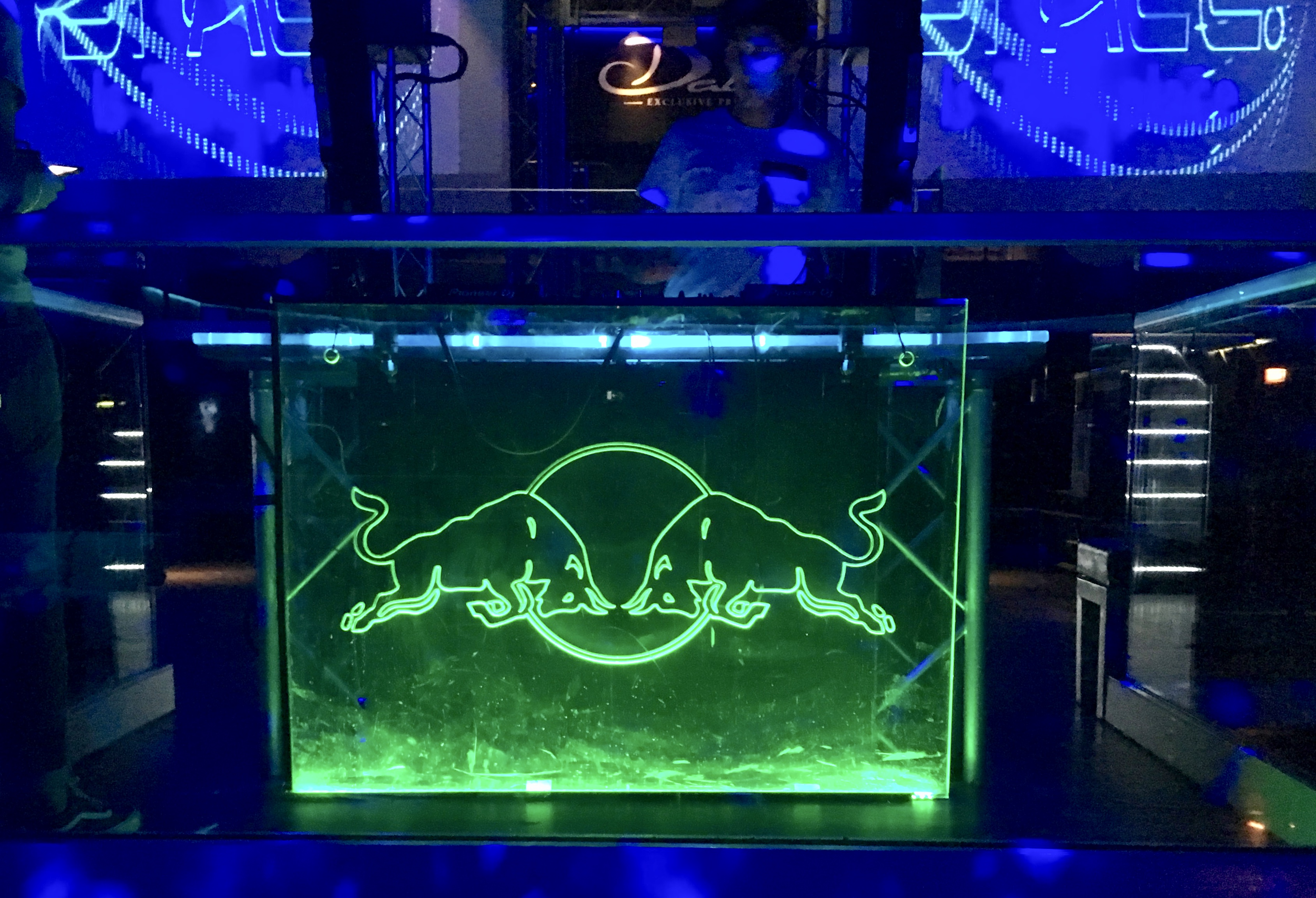 Space Electronic, discoteca di Firenze